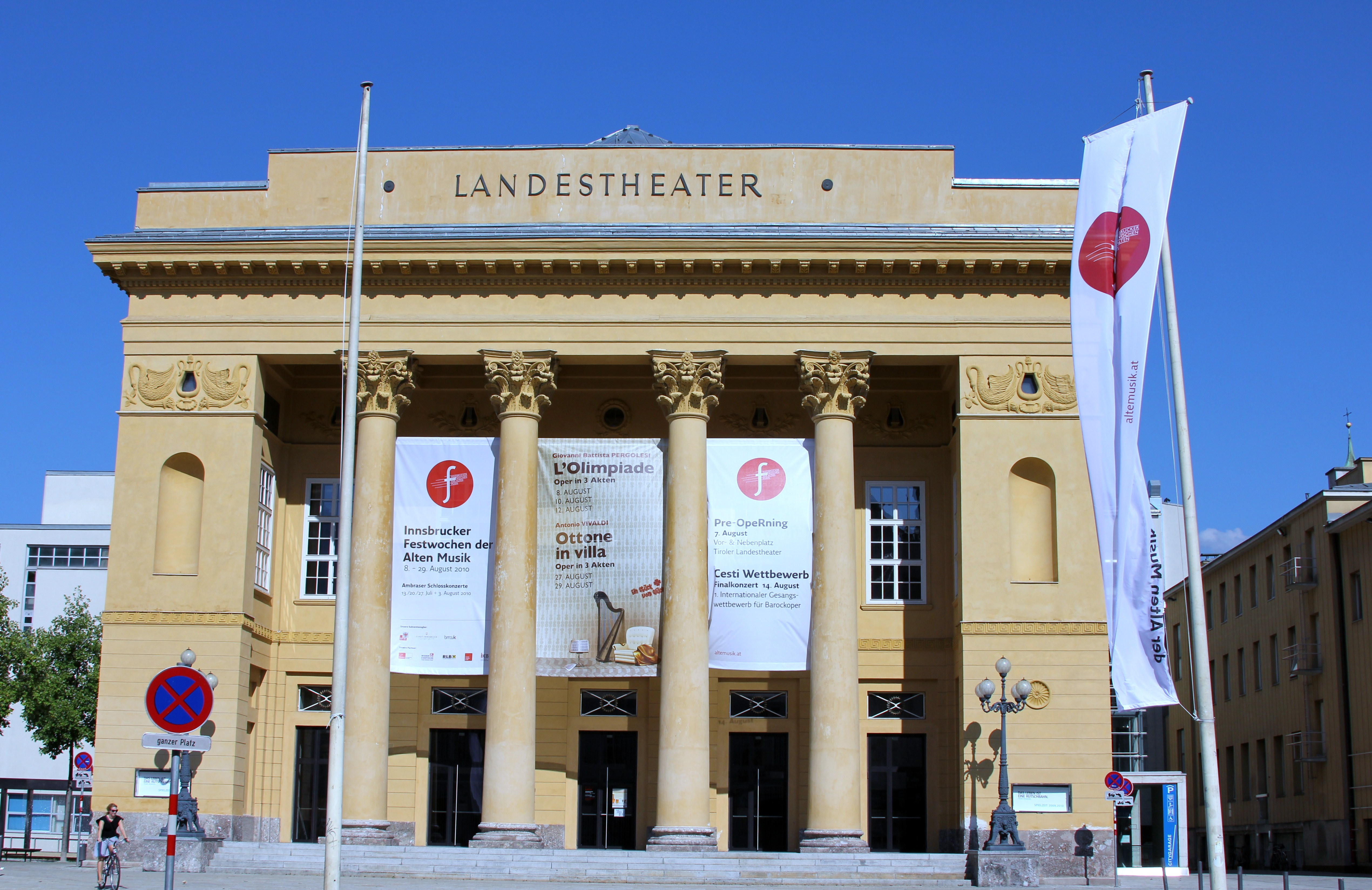 Tiroler Landestheater, Innsbruck, Austria